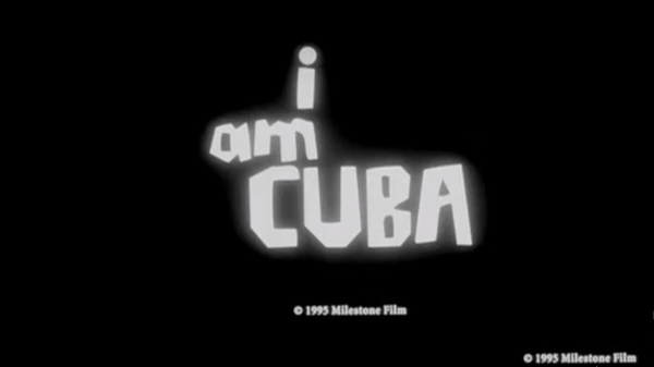 Титры релиза фильма «Я — Куба», представленного Milestone Films в 1995 году